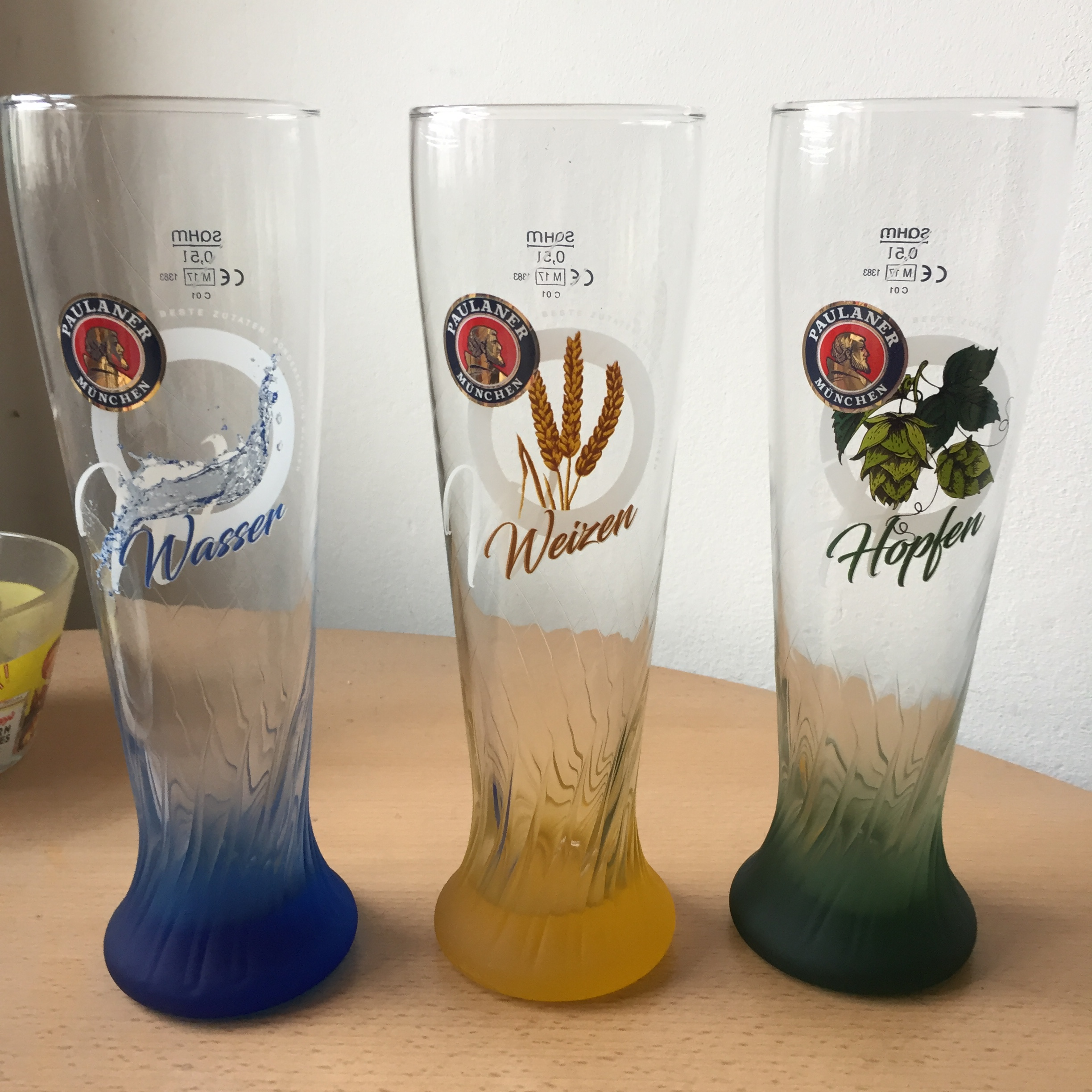 Weizengläser nach Zutaten